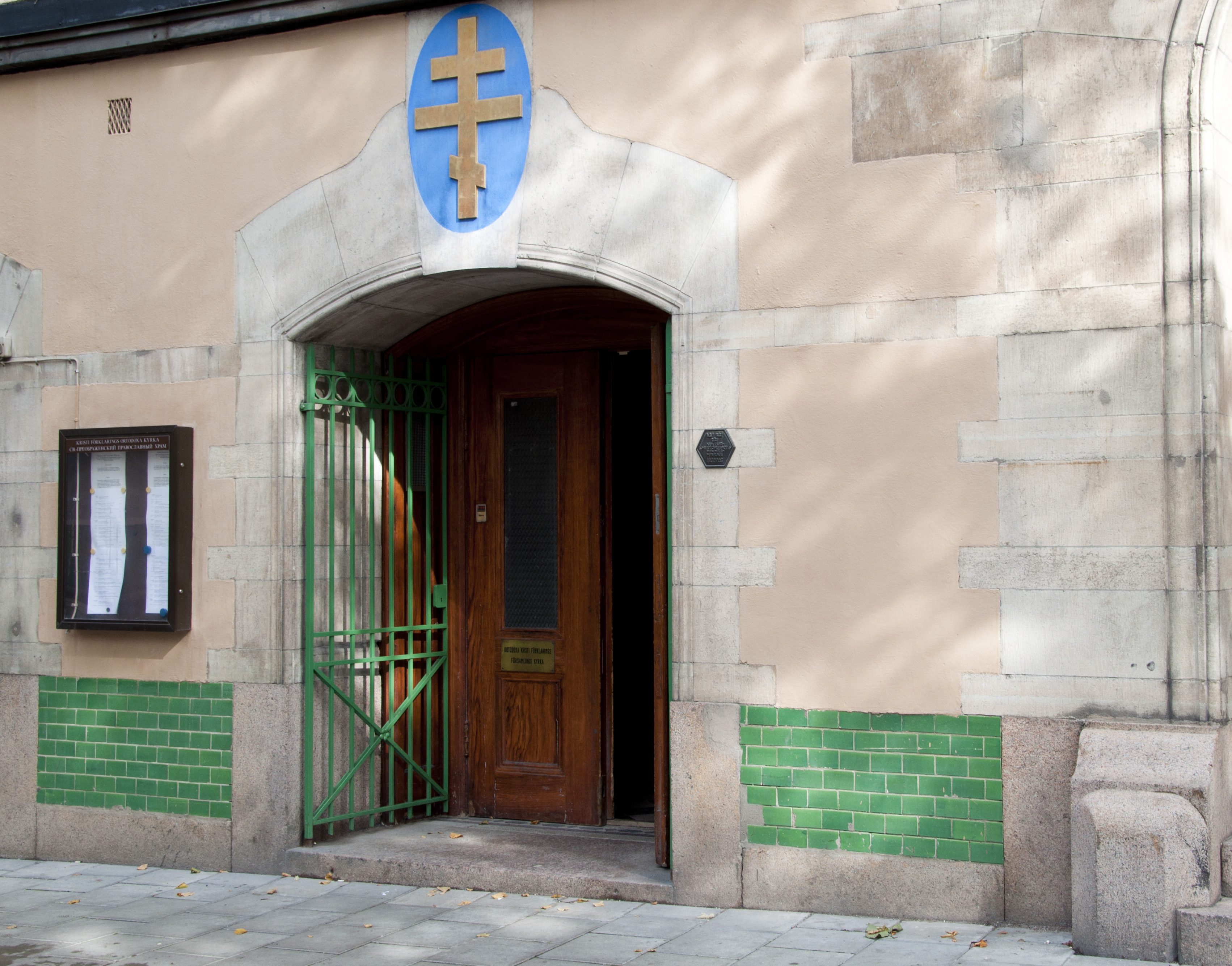 Kristi Förklarings ortodoxa kyrka